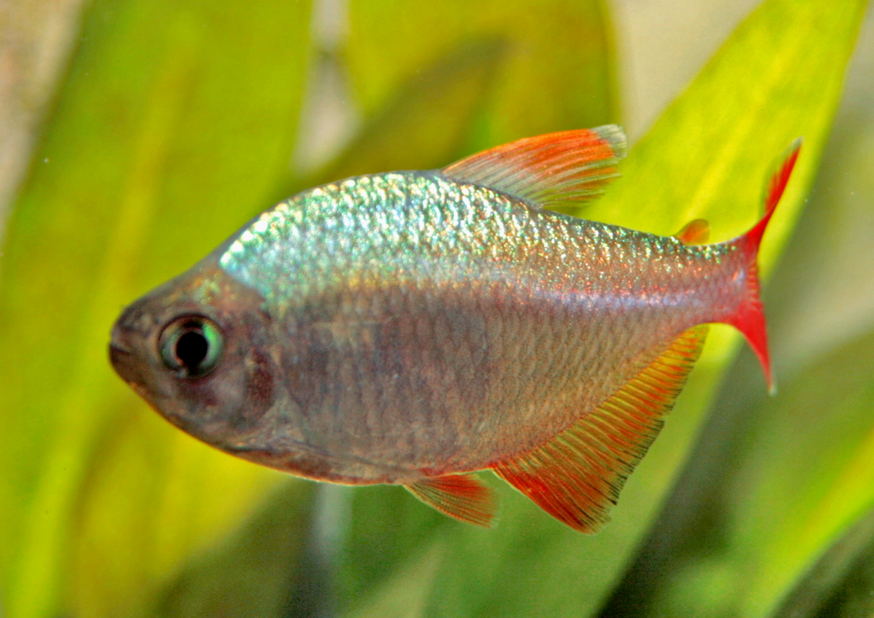 Un esemplare di Hyphessobrycon colombianus